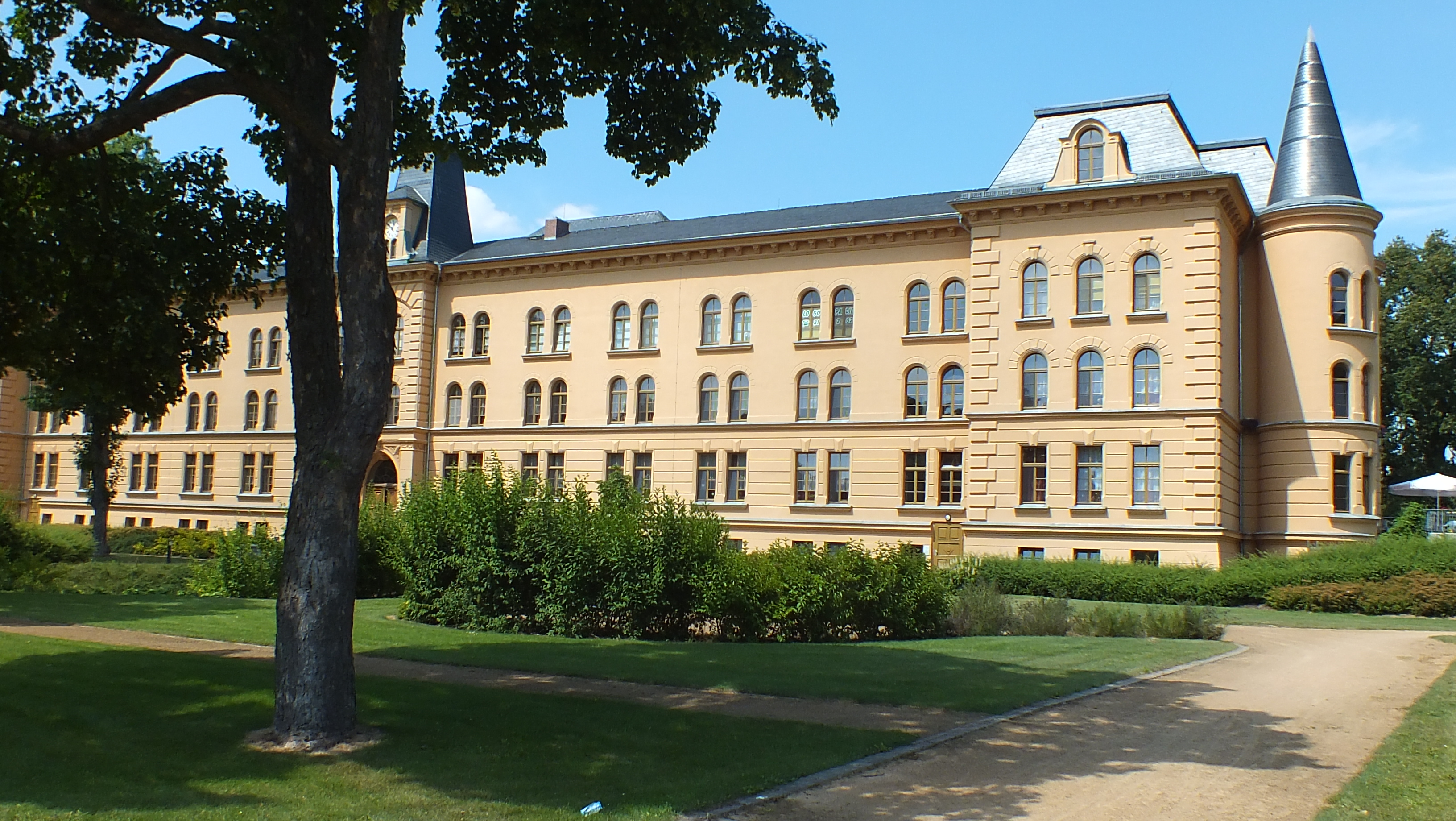 Ehemalige Unteroffiziersvorschule in Annaburg